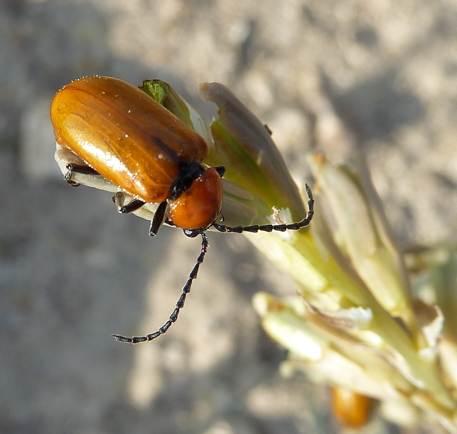 Exosoma lusitanicum (Galeruca de los narcisos), sobre Dipcadi serotinum (Jacinto bastardo/leonado) - Cabezo de los Ojales/de las Fuentes, Albatera (Alicante, España)